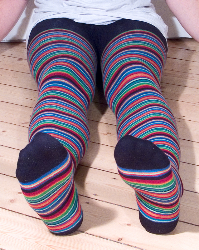 Strickstrumpfhose, geringelt